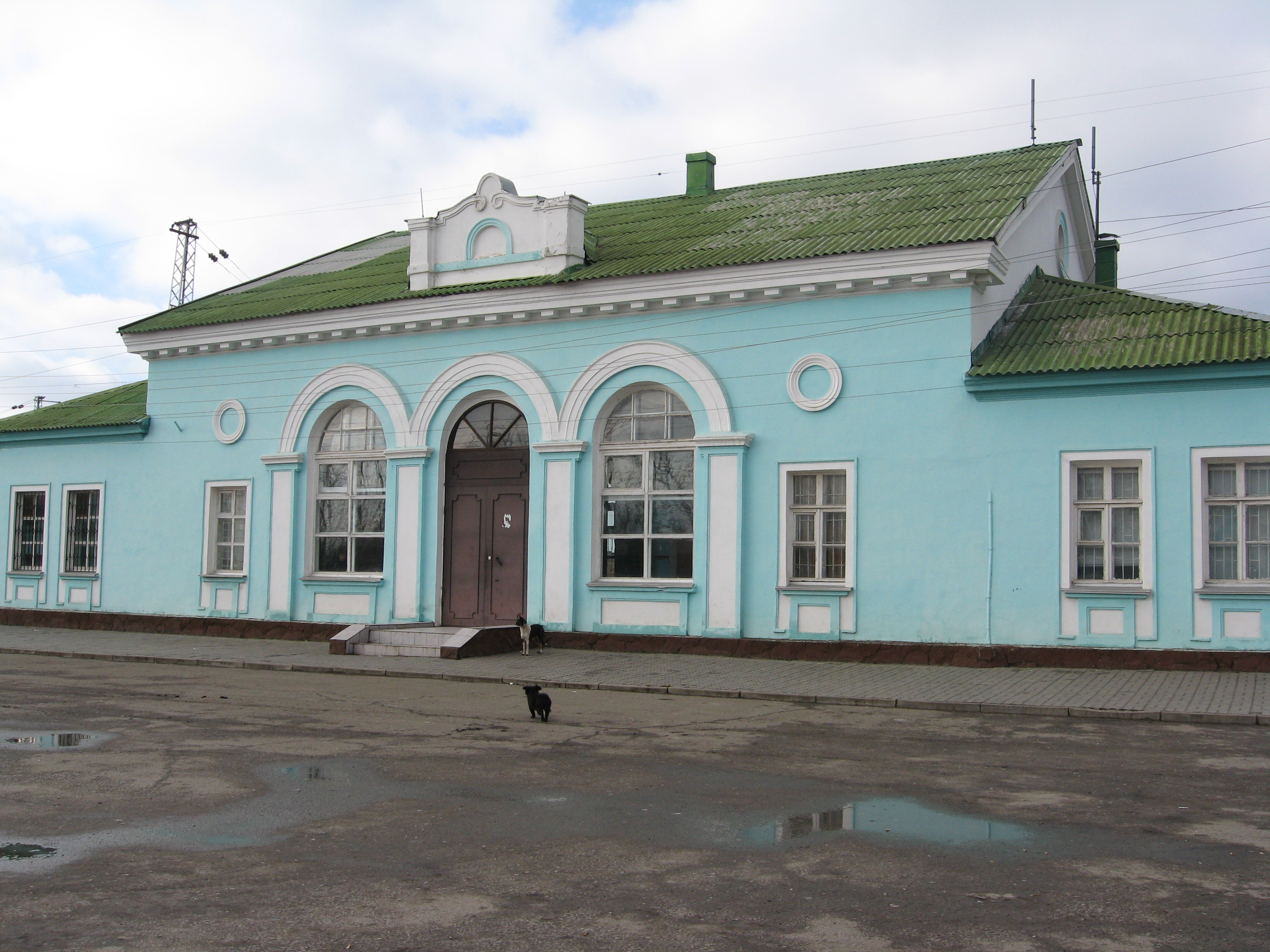 Здание железнодорожной станции "Каяла" (с. Самарское, Азовский район, Ростовская область).